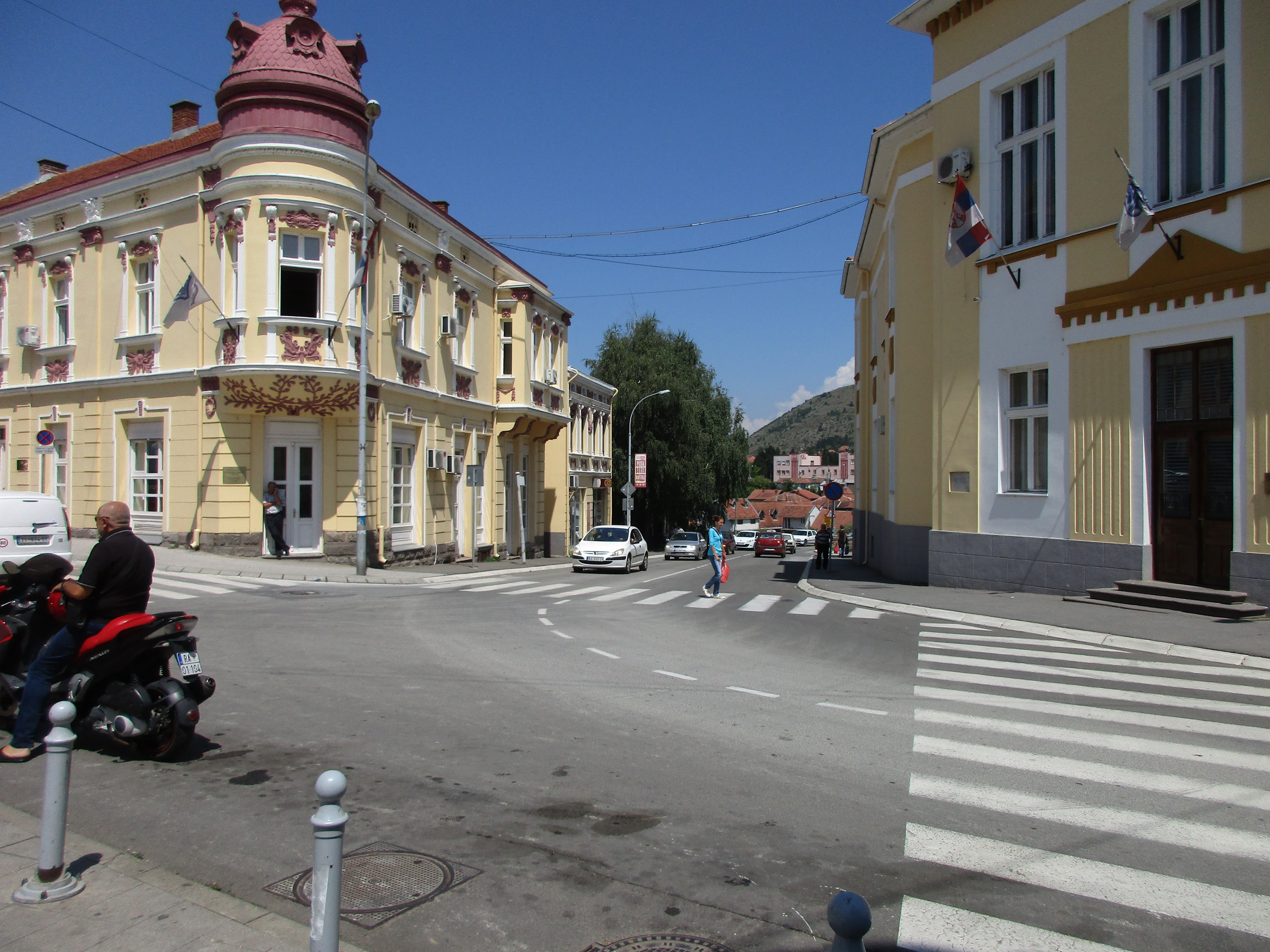 Srpski (latinica): Raška